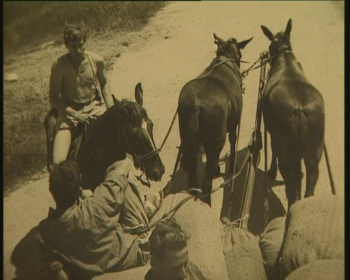 האמנם קמל הפרח